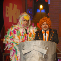 "Salomón y Tutu-Tutu" presentando una categoría en los BKN Awards 2007.